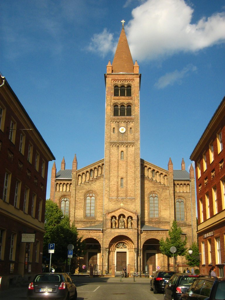 Die katholischen Kirche St. Peter und Paul in Potsdam (Brandenburg). Blick von Westen (Brandenburger Straße).